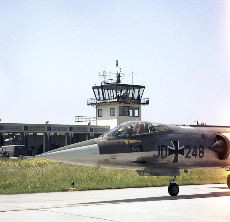 Reportage Bundeswehr: JG 74 (Jagdgeschwader)